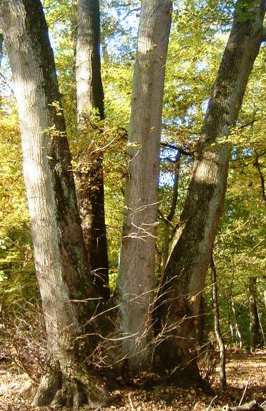 durch Stockausschlag entstandener Vierling, (Standort: Schwanheimer Wald, Frankkfurt am Main)